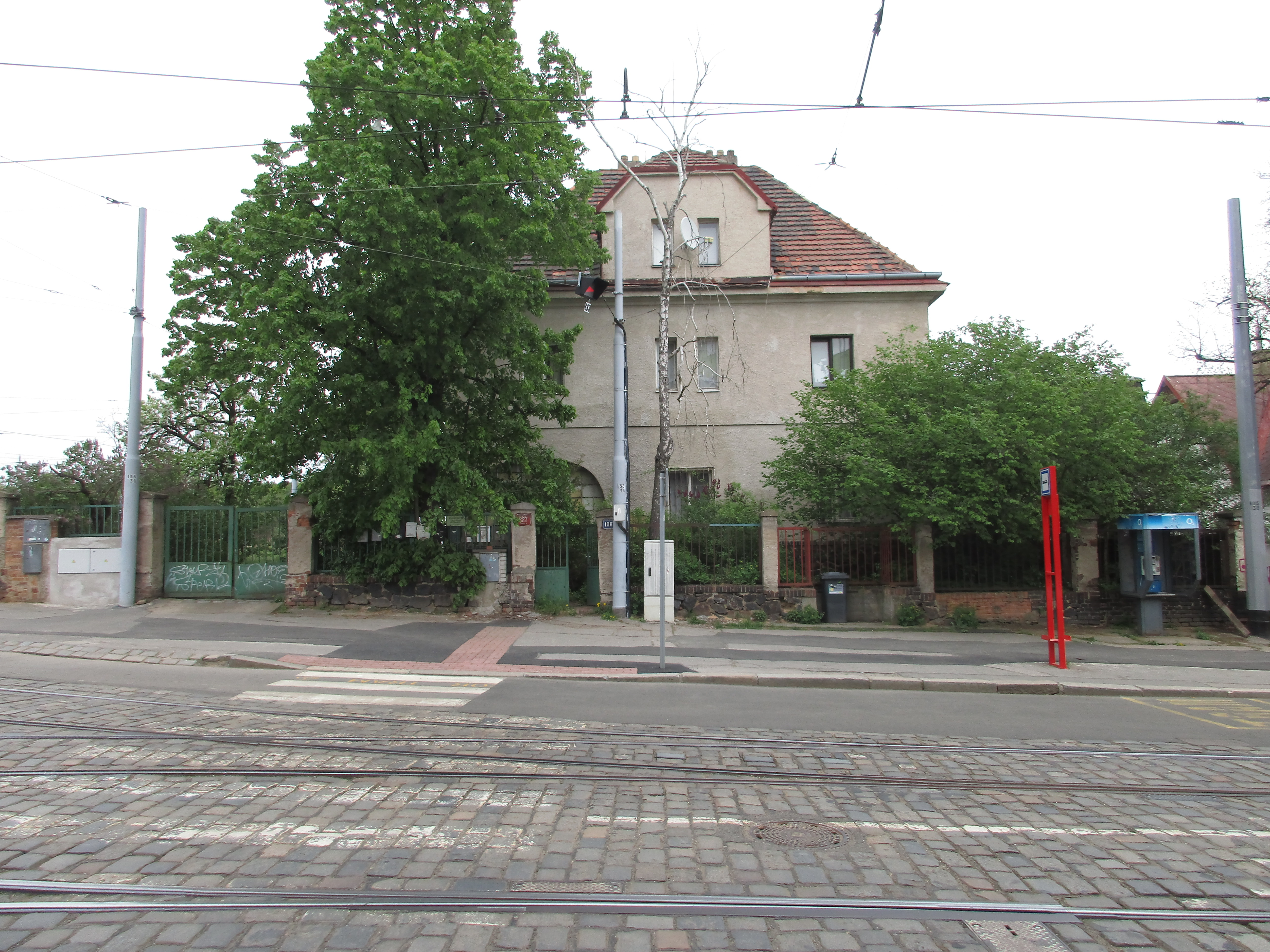 Praha 8-Kobylisy, Klapkova 894/108. Budova bývalého akcízu.